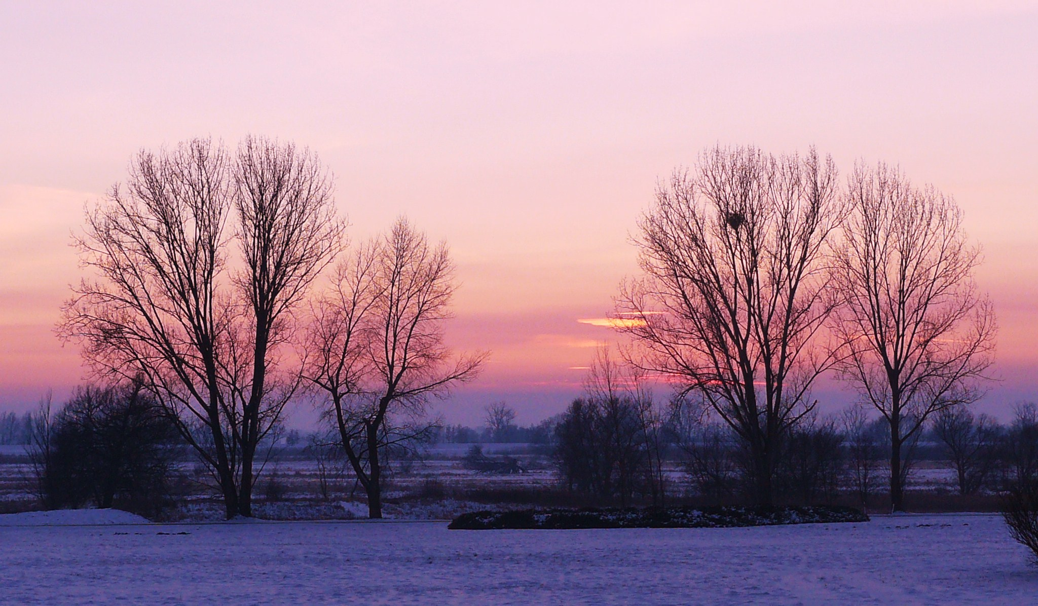 Odra w Starych Łysogórkach.